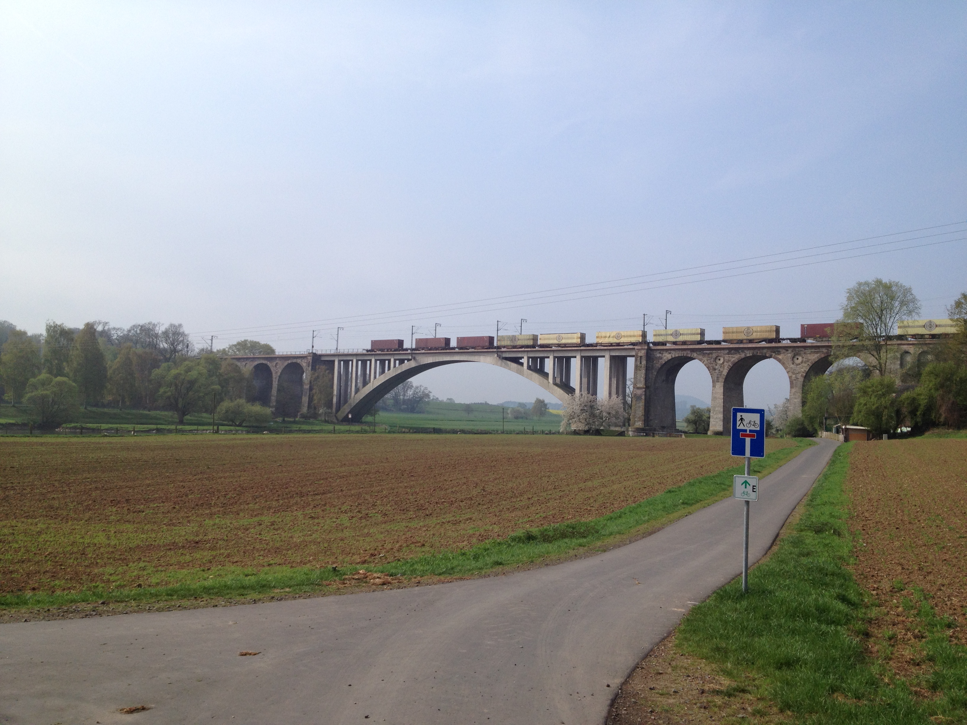 Eco Pfad Kulturgeschichte Guntershausen, Fuldahöhenweg, Kassel-Steig, Fulda-Radweg, Ederauenradweg